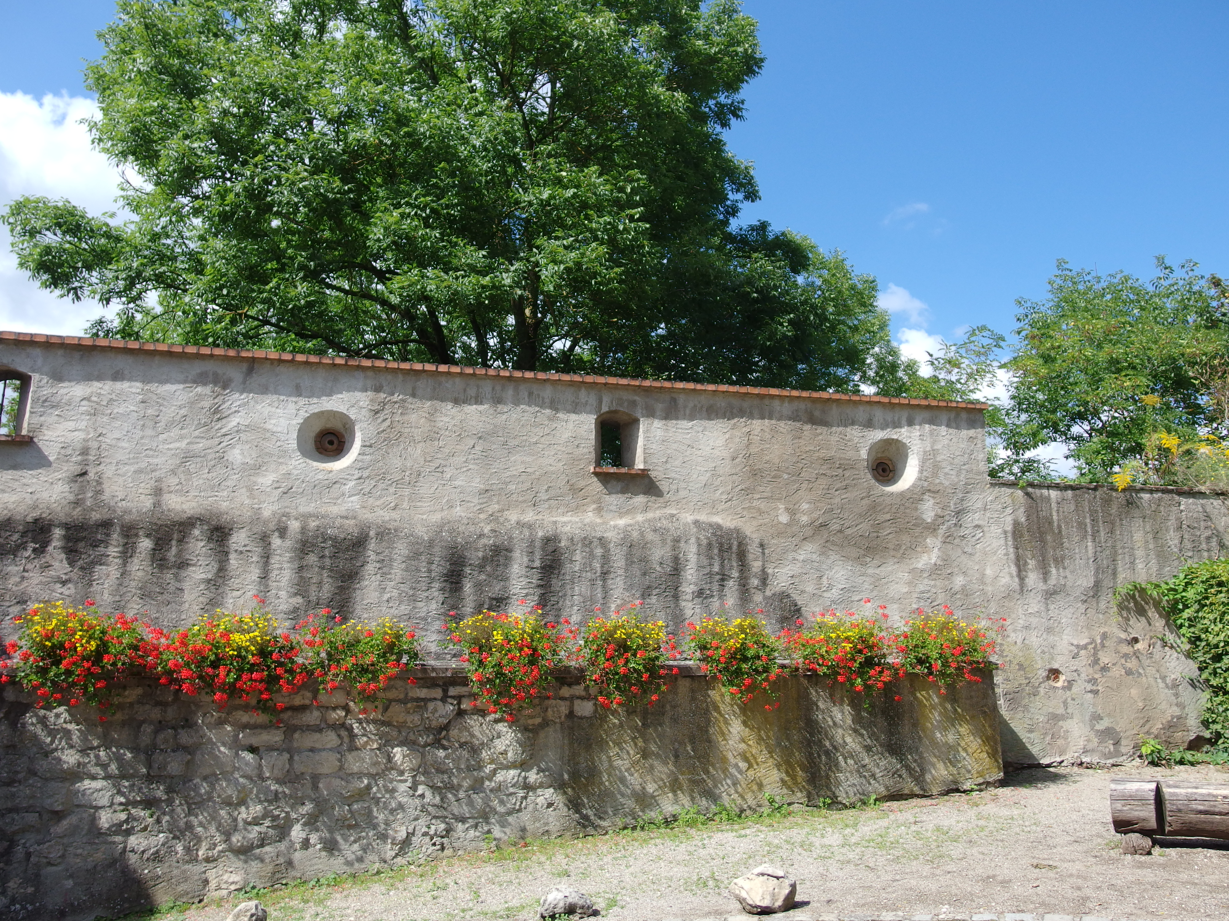 Harburg, Schloß Harburg; Wehrgang Richtung Nord mit Holzaugen und SchießöffnungenThis is a photograph of an architectural monument.